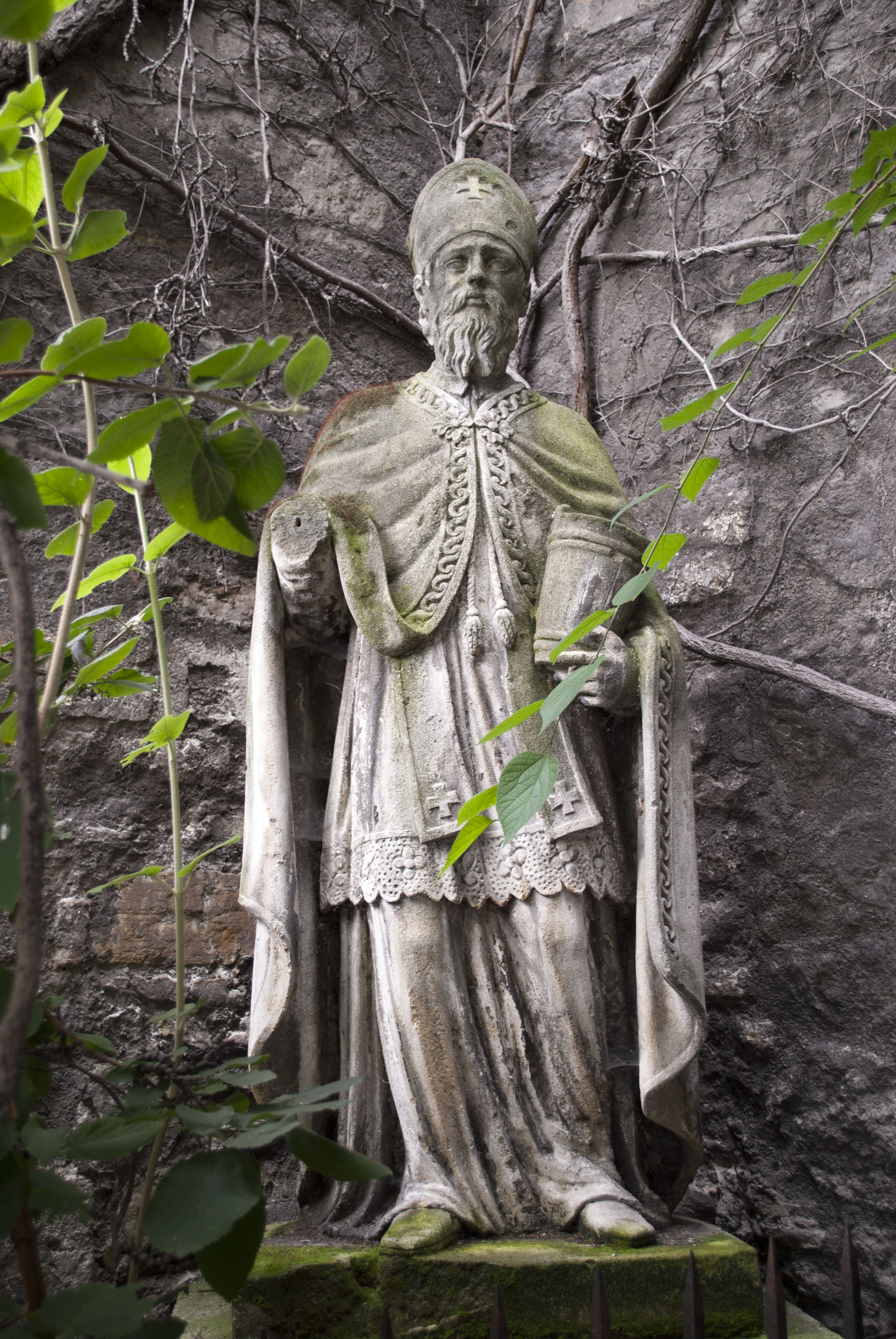 Kirche hl. Ruprecht, Ruprechtskirche